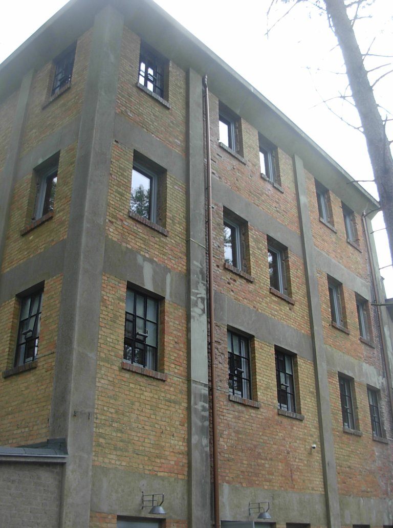 Eksploseum w Bydgoszczy - jeden z budynków NGL-Betrieb